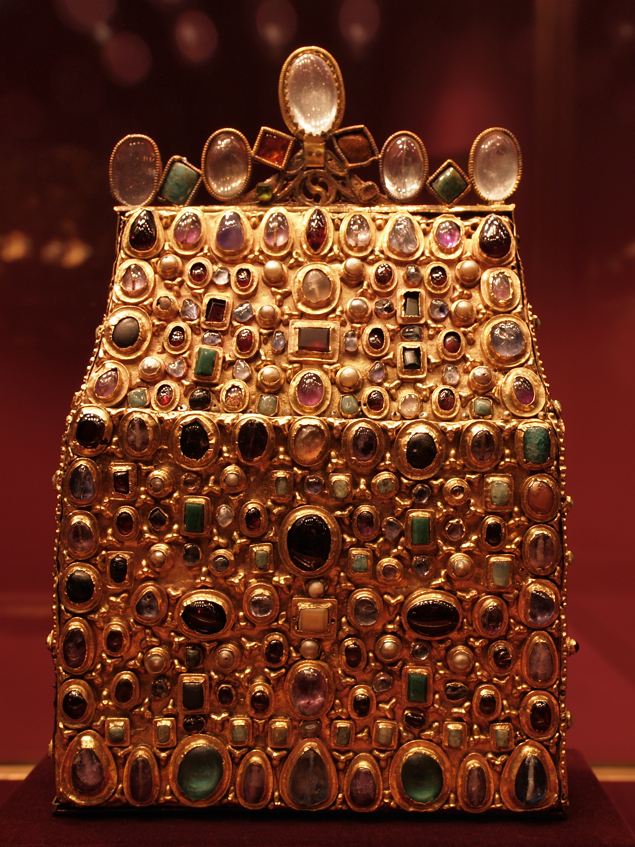 Stephansbursa, Teil der Reichskleinodien des Heiligen Römischen Reiches (HRE). Standort: Weltliche Schatzkammer, Wien